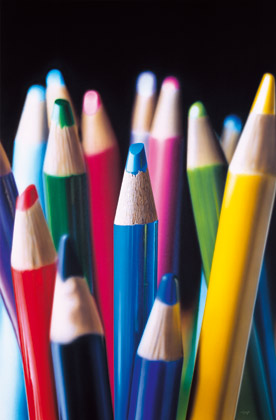 Pencils